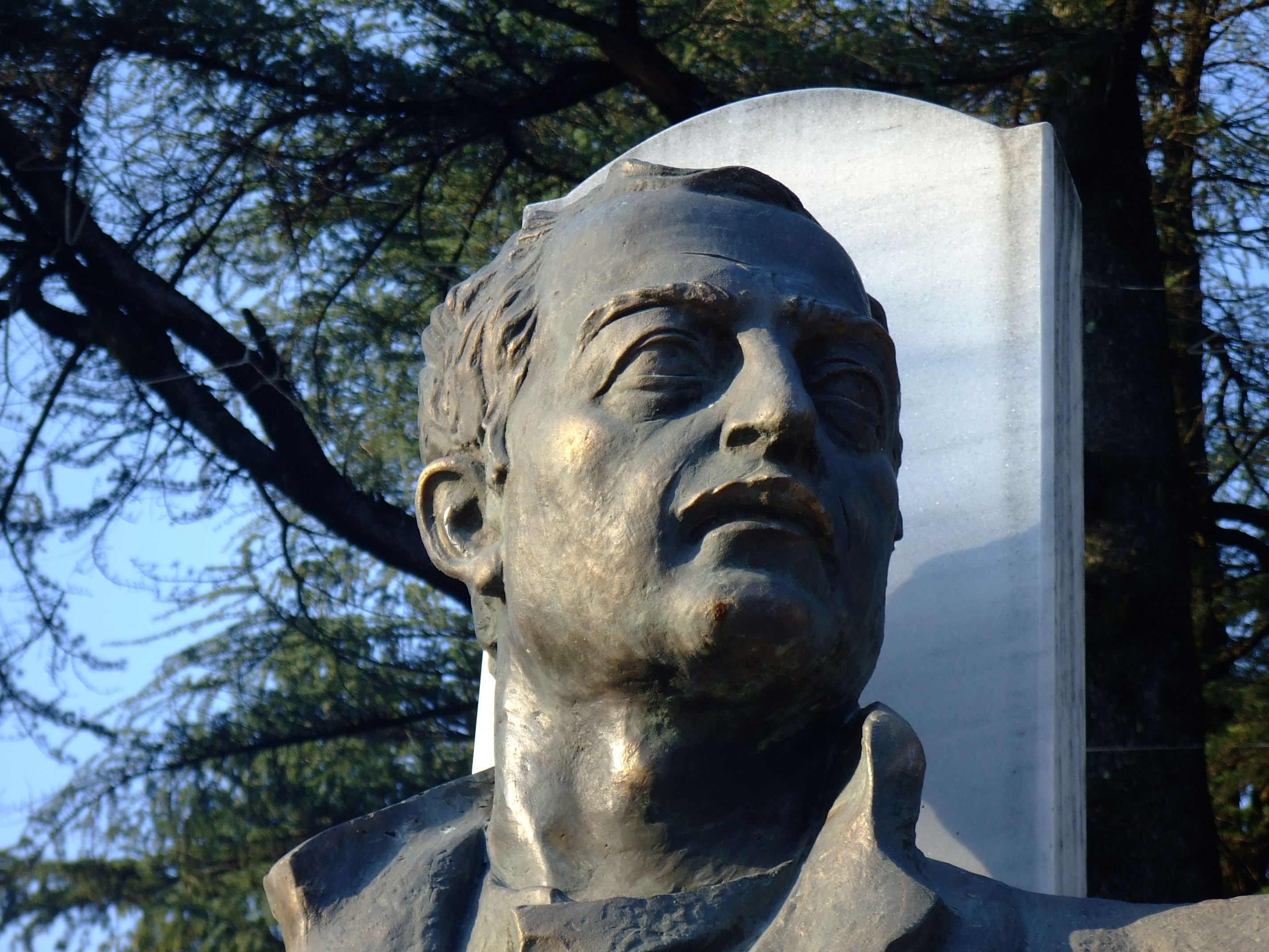 10 August 2009